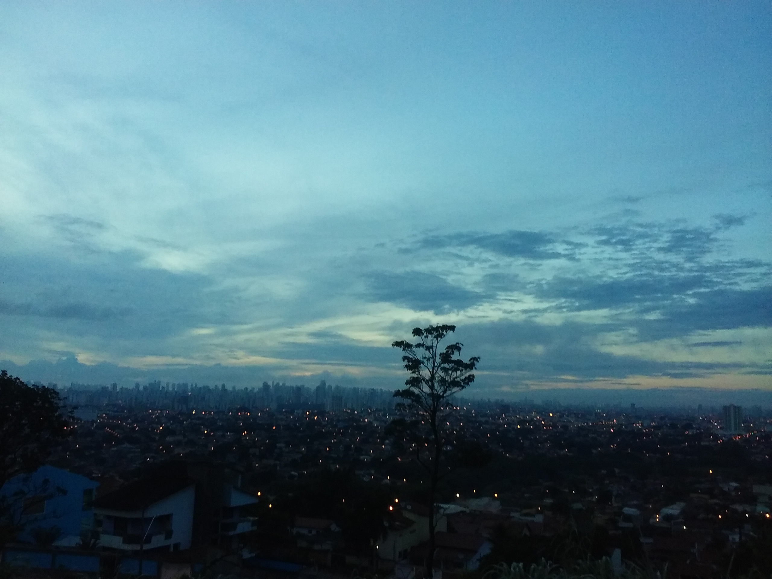 Goiânia